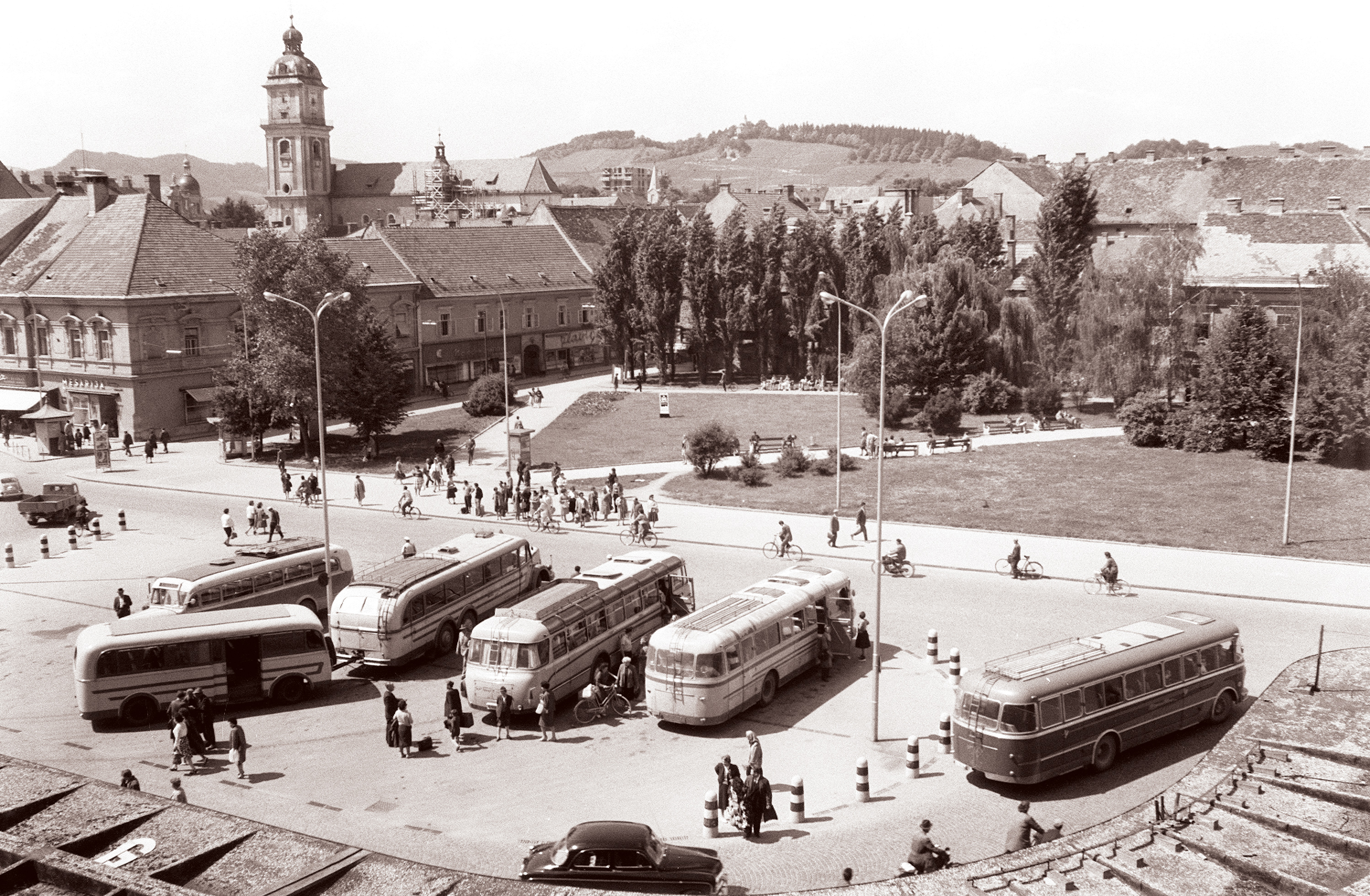 Glavni trg v Mariboru ob dveh